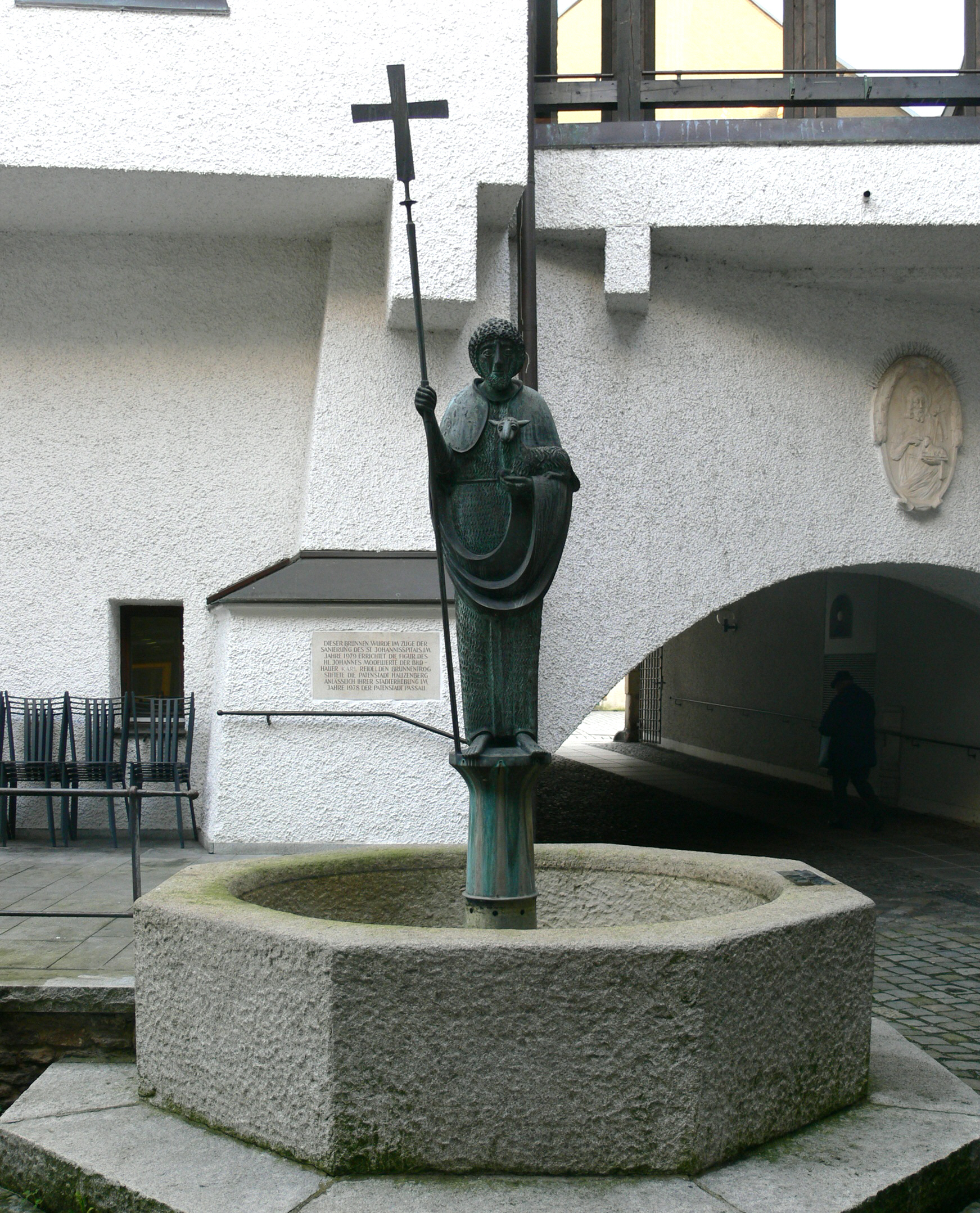 Passau, Johannes-Brunnen im öffentlich zugänglichen Innenhof des Johannes-Spitals, Brunnenfigur von Karl Reidel Karl Reidel (1927–2006) DescriptionGerman sculptorDate of birth/death25 September 192714 January 2006Location of birth/deathLandshutKumhausenAuthority control : Q1732672 VIAF: 37723579 ISNI: 0000 0000 1386 1409 GND: 119304066 BNF: 14462049g RKD: 459690